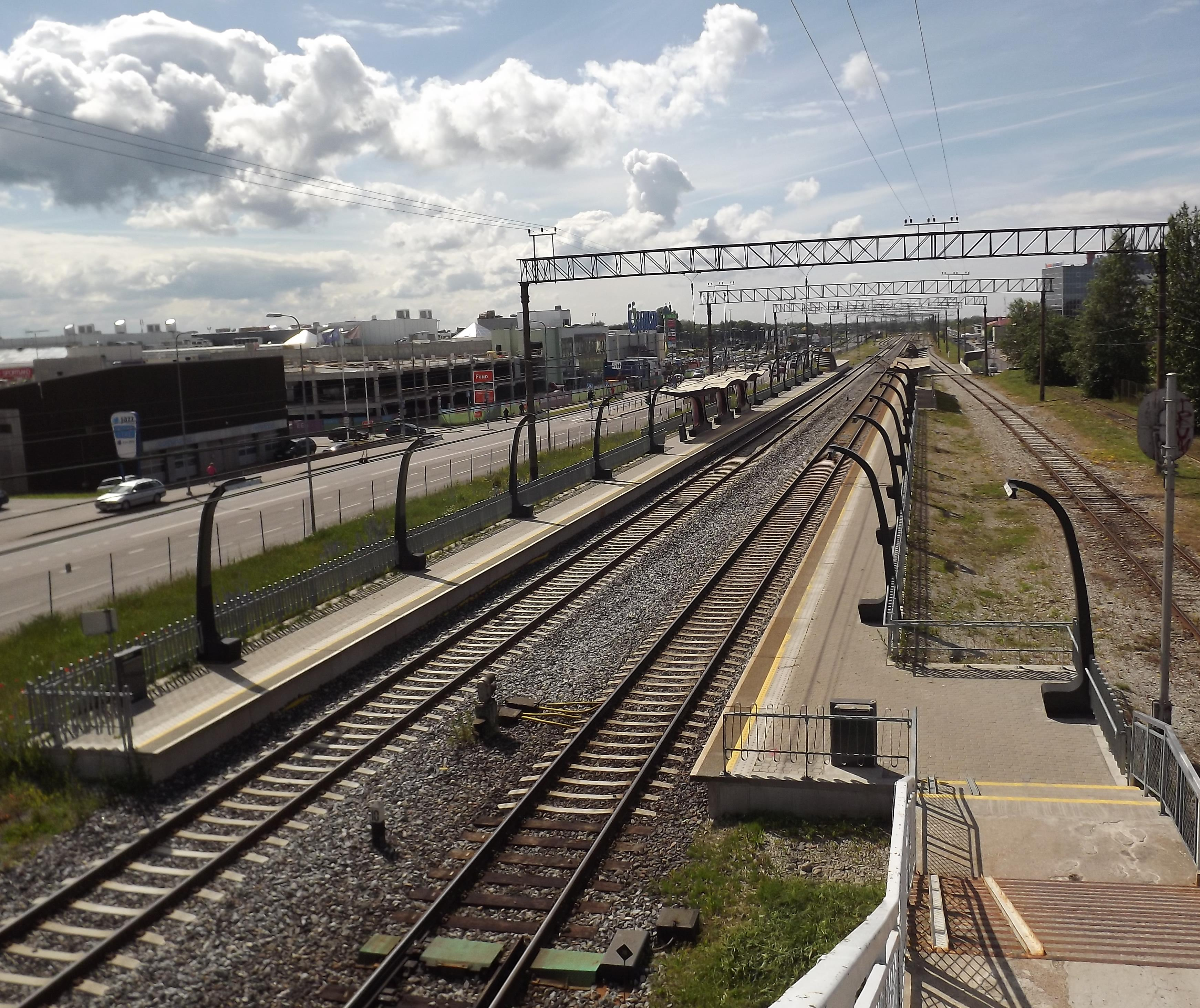 Ülemiste raudteepeatus vaatega läände.